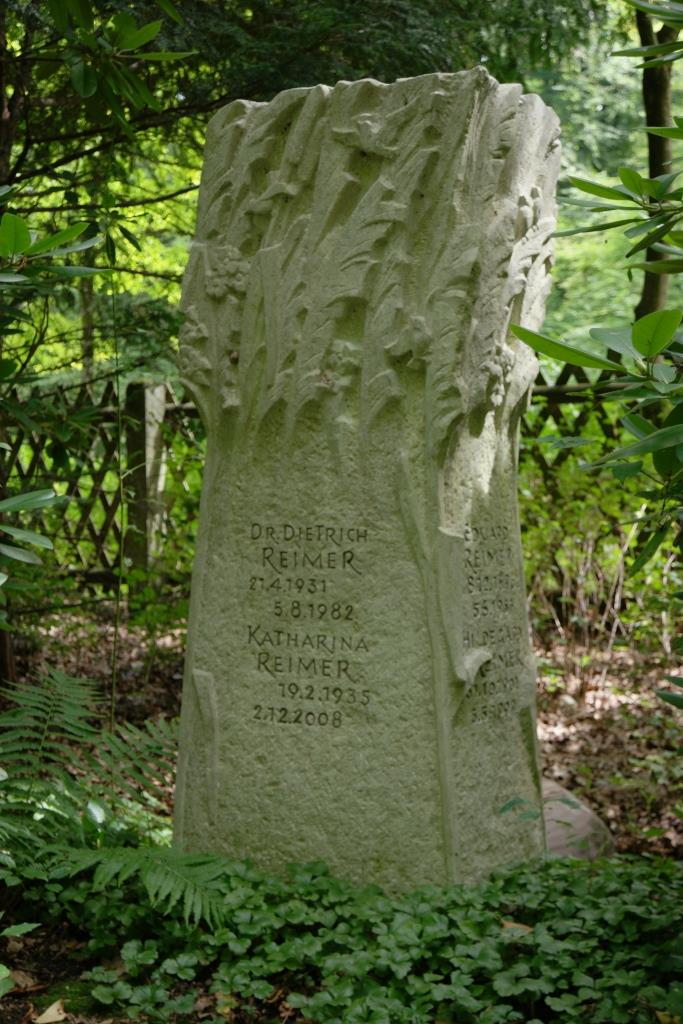 Grab des Präsidenten des Deutschen Patentamtes Eduard Reimer, 1896-1957, auf dem Waldfriedhof in München-Solln